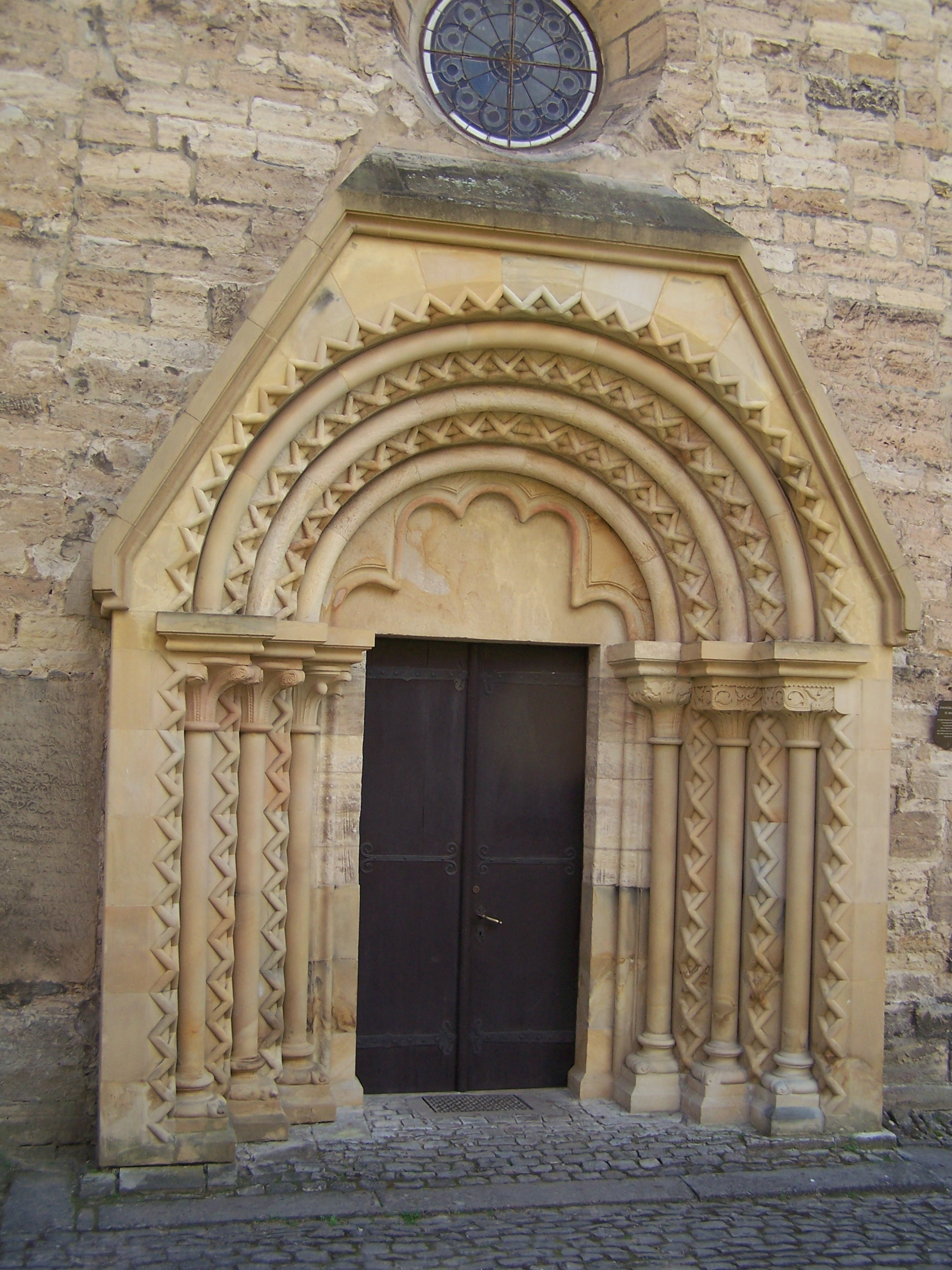 Ansichten und Details der romanischen Stadtpfarrkirche St.-Bonifatius in der Altstadt von Treffurt.